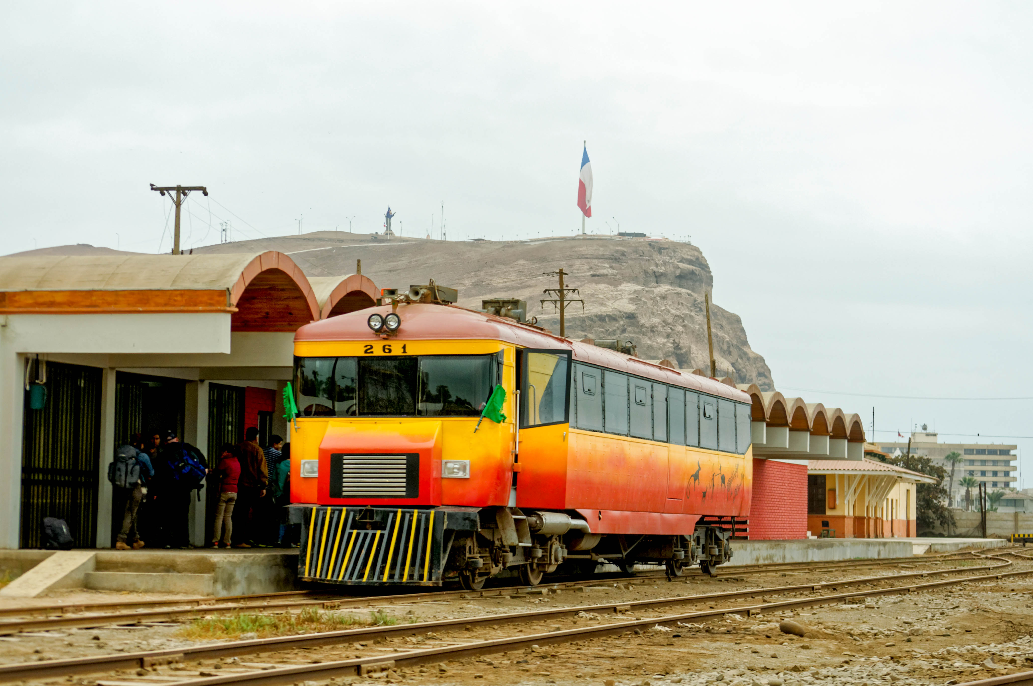 La clasica postal del tren y el morro de arica como telon de fondo, escena que no se puede dejar pasar, así que un par de fotos y arriba del autovagon para irnos a Perú. Estación del FCTA Arica. Agosto, 2016